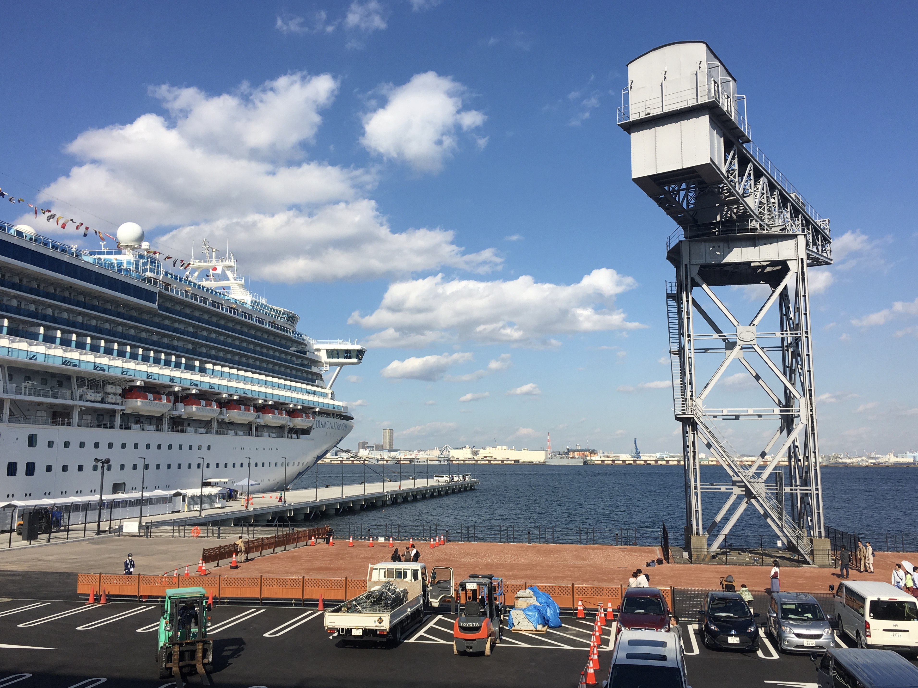 横浜市中区新港にある複合施設「横浜ハンマーヘッド」（新港ふ頭客船ターミナル）へ2019年11月4日に第一号入港したクルーズ客船「ダイヤモンドプリンセス」。右側は歴史的な産業遺構の「ハンマーヘッドクレーン」。